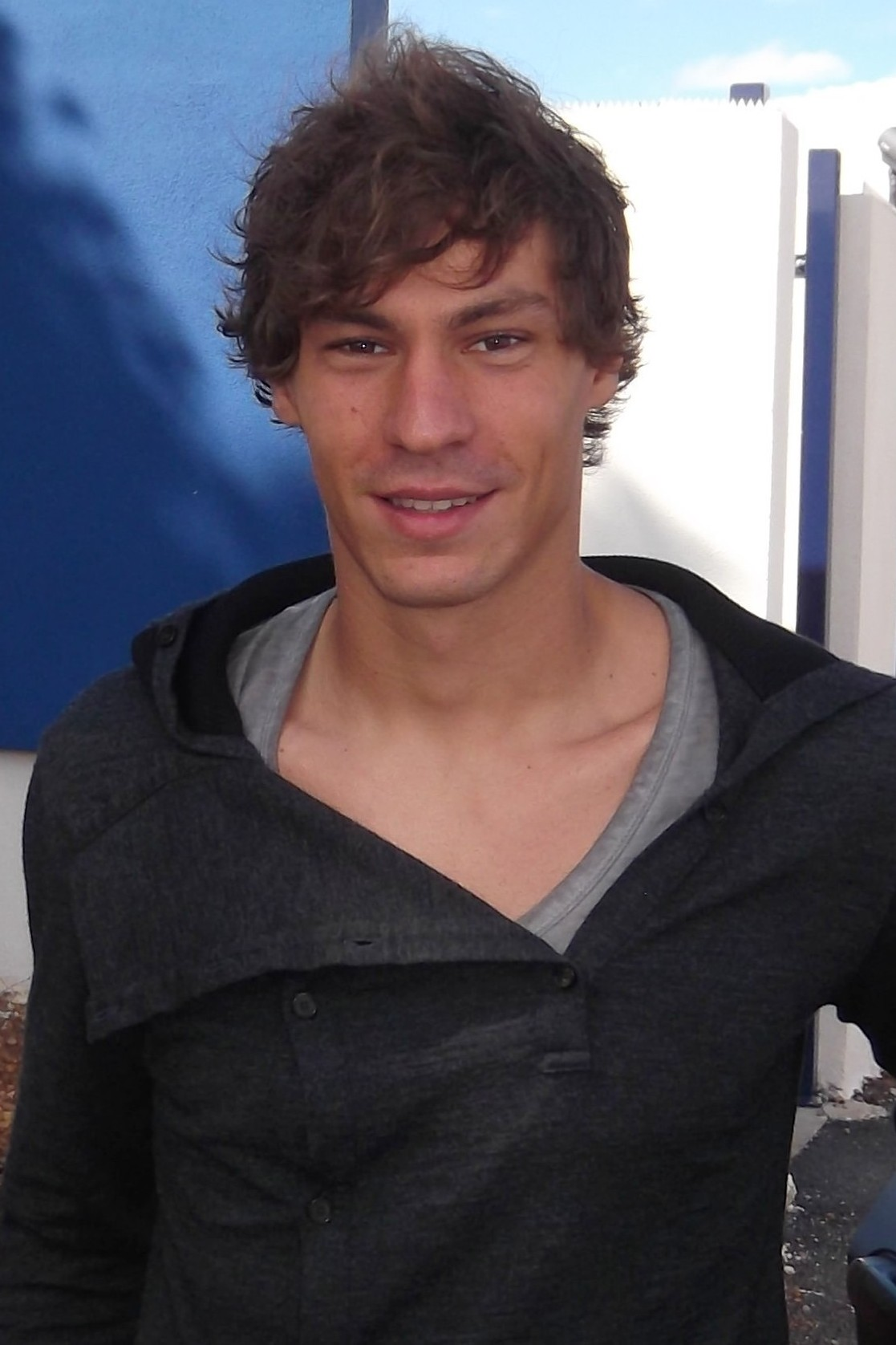 Benjamin Stambouli (MHSC), été 2013 (crop).